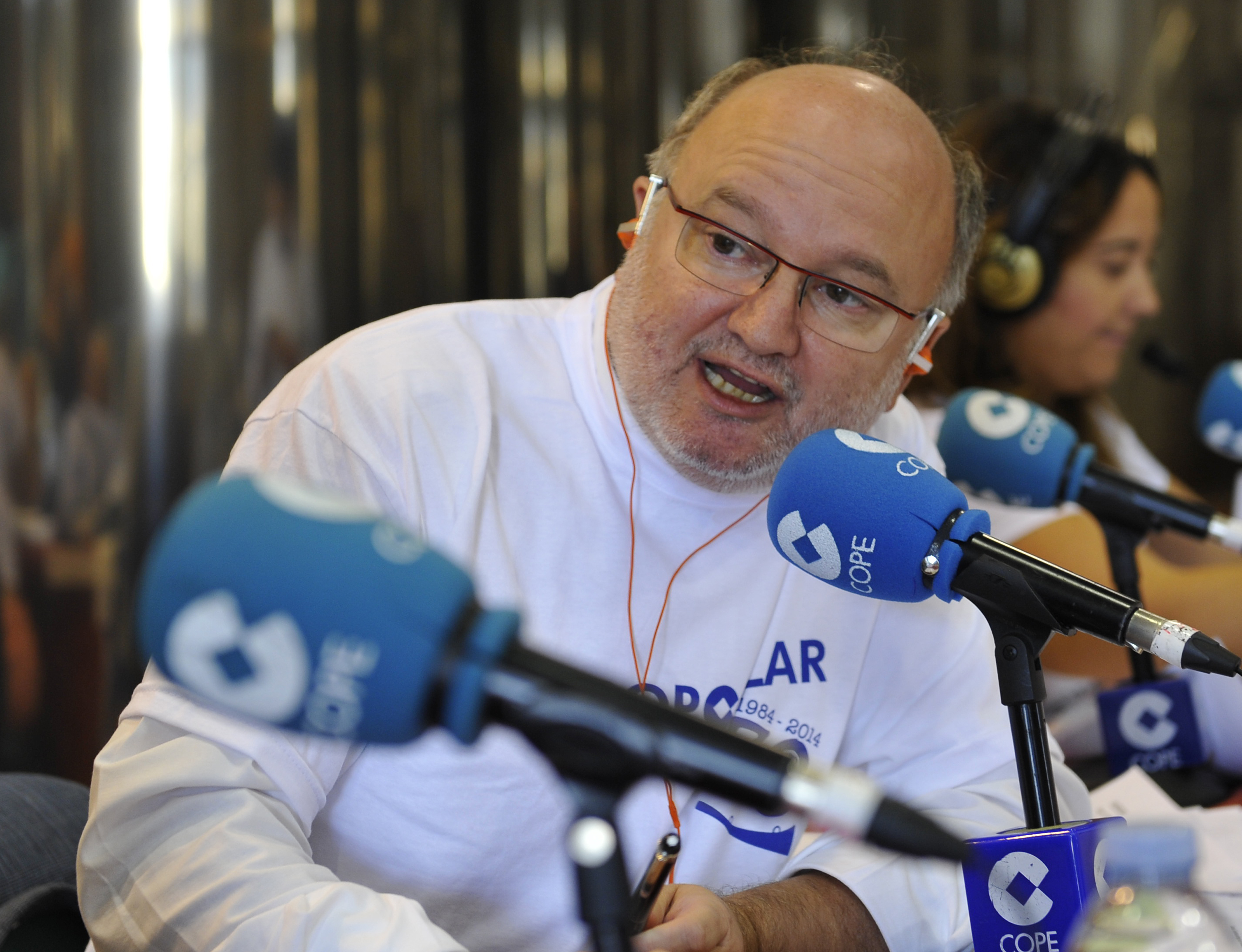 César Lumbreras por @juancamartos, Villargordo (Jaén)